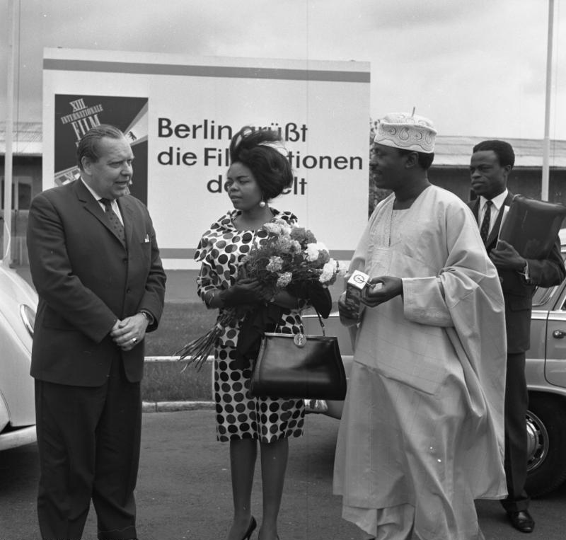 Ankunft des nig. Inform. Min. Benson Flughafen Tegel (T.O.S. Benson und Ehefrau - nigerianischer Informationsminister)